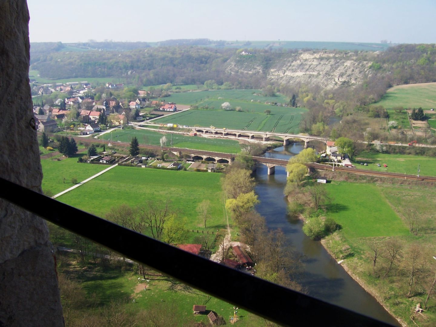 Blick auf die Saale bei Saaleck